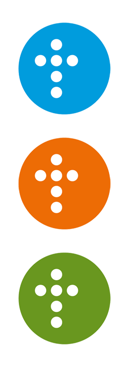 Kansanlähetyksen logot (vuodesta 2019 lähtien)